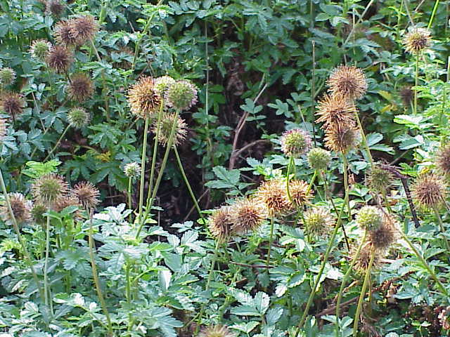 Species: Acaena novae-zelandiae Family: Rosaceae Image No. 2